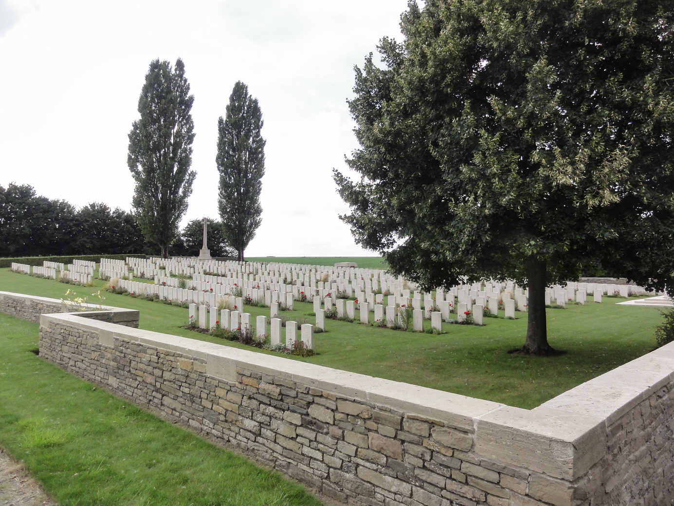 Unicorn Cemetery